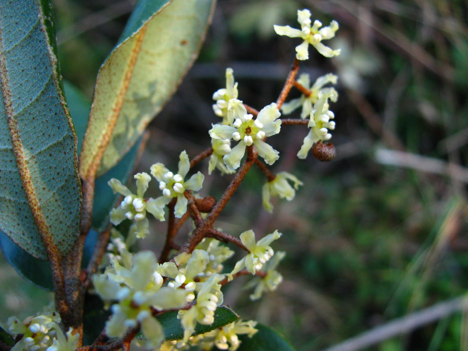 Flores masculinas en pleno invierno